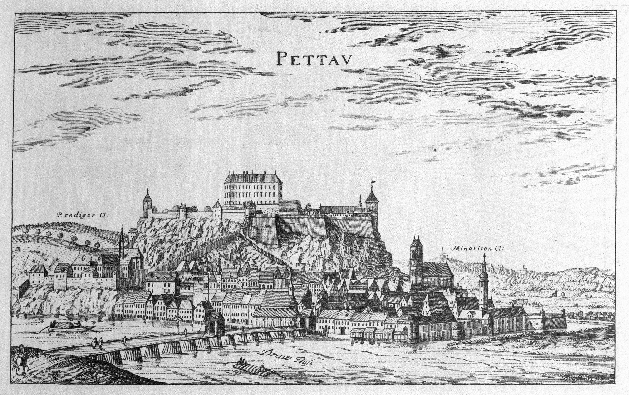 G. M. Vischers Käyserlichen Geographi, Topographia Ducatus Stiriae, Das ist: Eigentliche Delineation / und Abbildung aller Städte / Schlösser / Marcktfleck / Lustgärten / Probsteyen / Stiffter / Clöster und Kirchen / so es sich im Herzogthumb Steyrmarck befinden; Und anjetzo Umb einen billichen Preyß zu finden seynd Bey Johann Bitsch Universitäts Buchhandlern / Auff dem Juden=Platz bey der guldenen Saulen. Graz 1681 Die Nummerierung der Dateien folgt der alphabetischen Reihung der Ortsnamen und entspricht nicht dem Vischer-Register